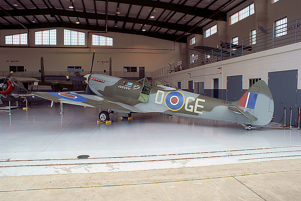 Supermarine_Spitfire_Mk.XVI_LRearSide_FOF_19Feb2010